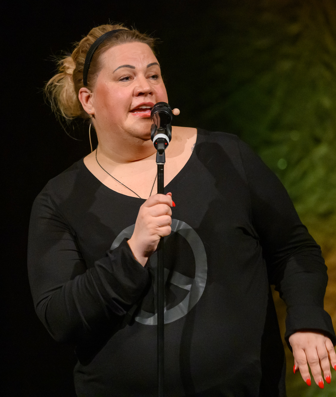 Abgeschminkt - und trotzdem Lustig,Comedy,Concertbüro Franken,Ilka Bessin,LUX – Junge Kirche Nürnberg,Livecomedy